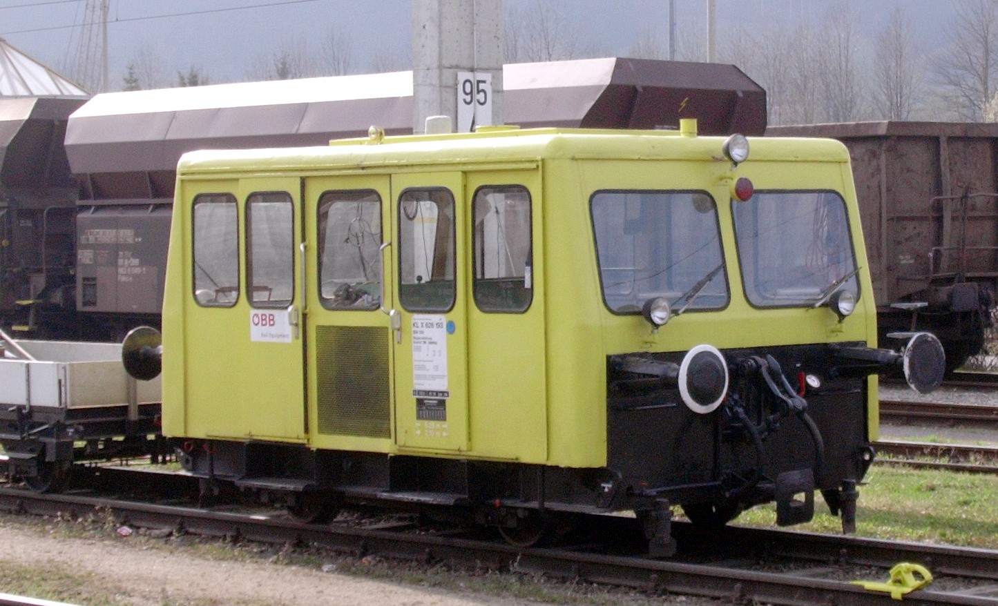 ÖBB X626